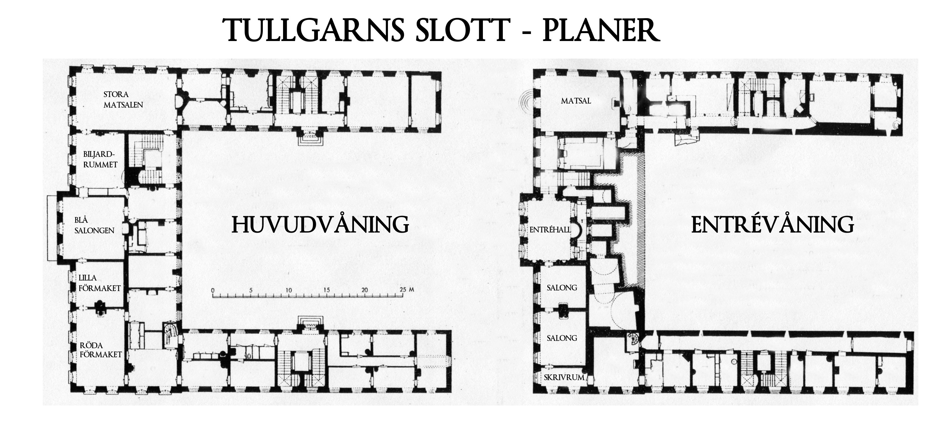 Tullgarns slott, planritningar